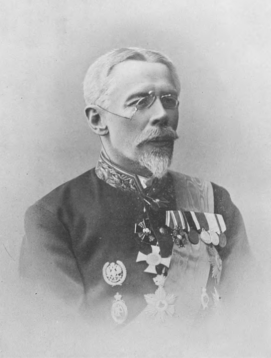 Николай Алексеевич Зиновьев (1839—1917) — русский государственный деятель, один из сыновей профессора А. З. Зиновьева.